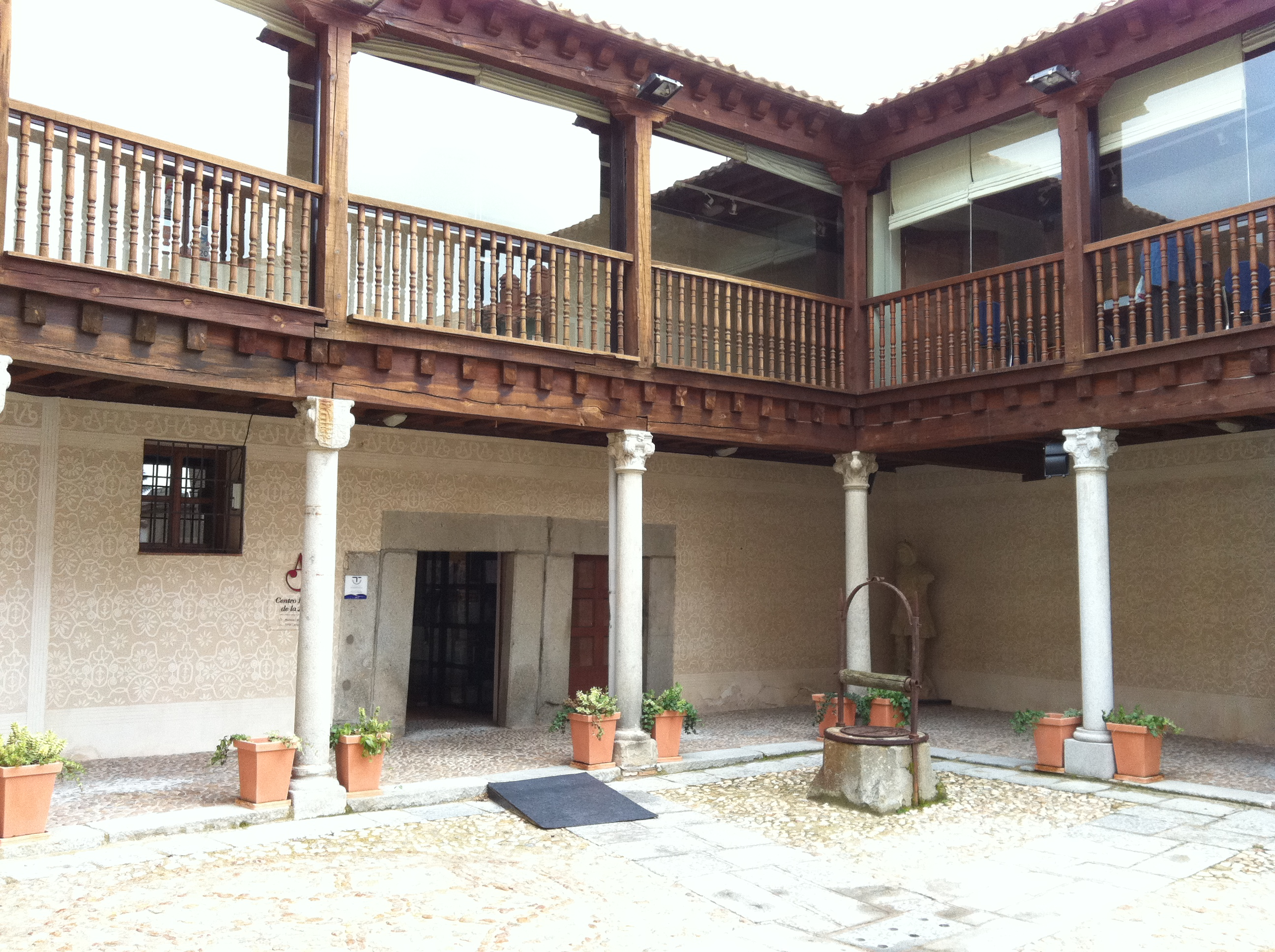 Patio interior de la casa de Abraham Senneor, posteriormente casa de Andrés Laguna y actualmente Centro Didáctico de la Judería de Segovia.